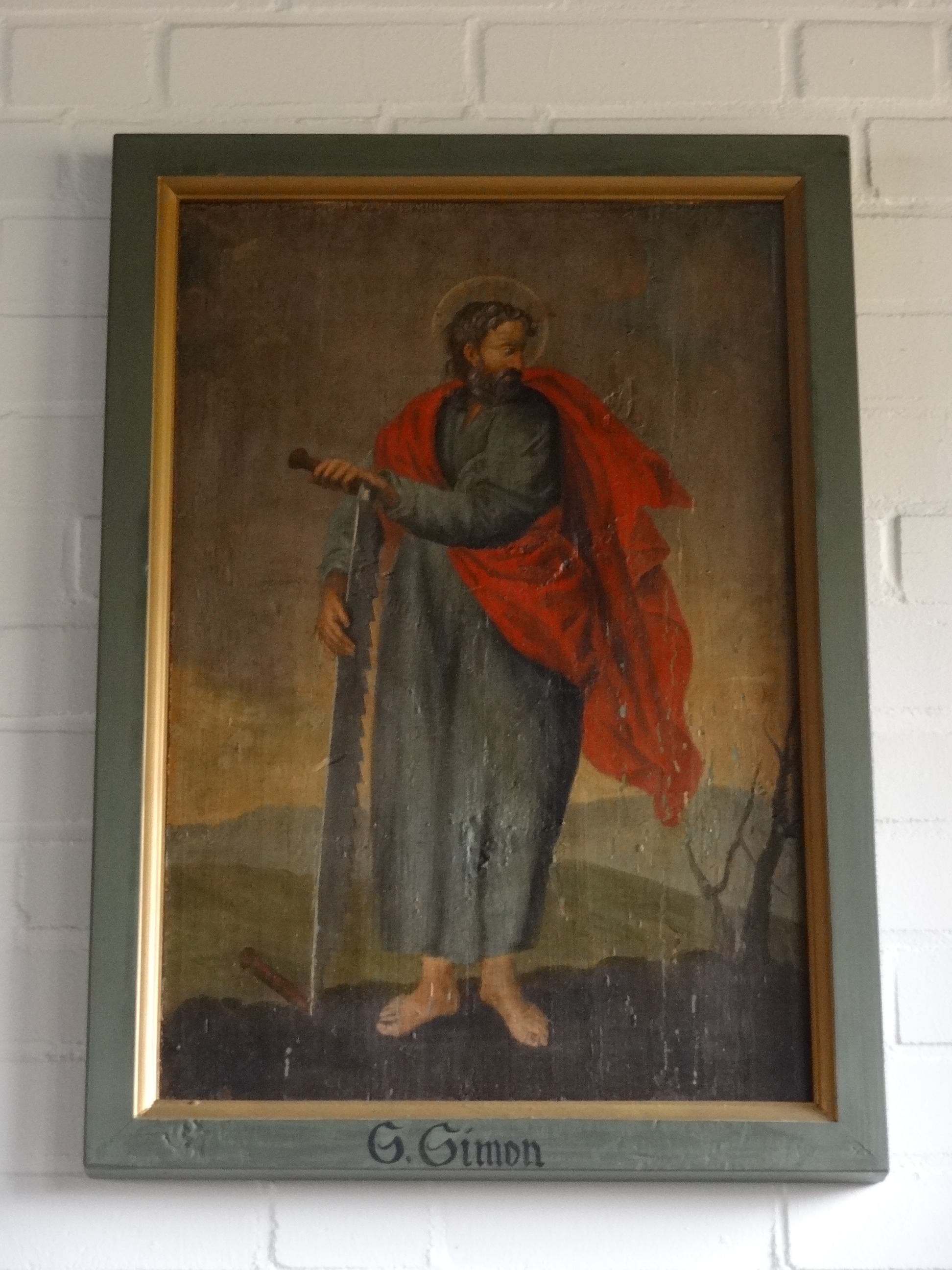 Evangelische Kirche (Hörnsheim)